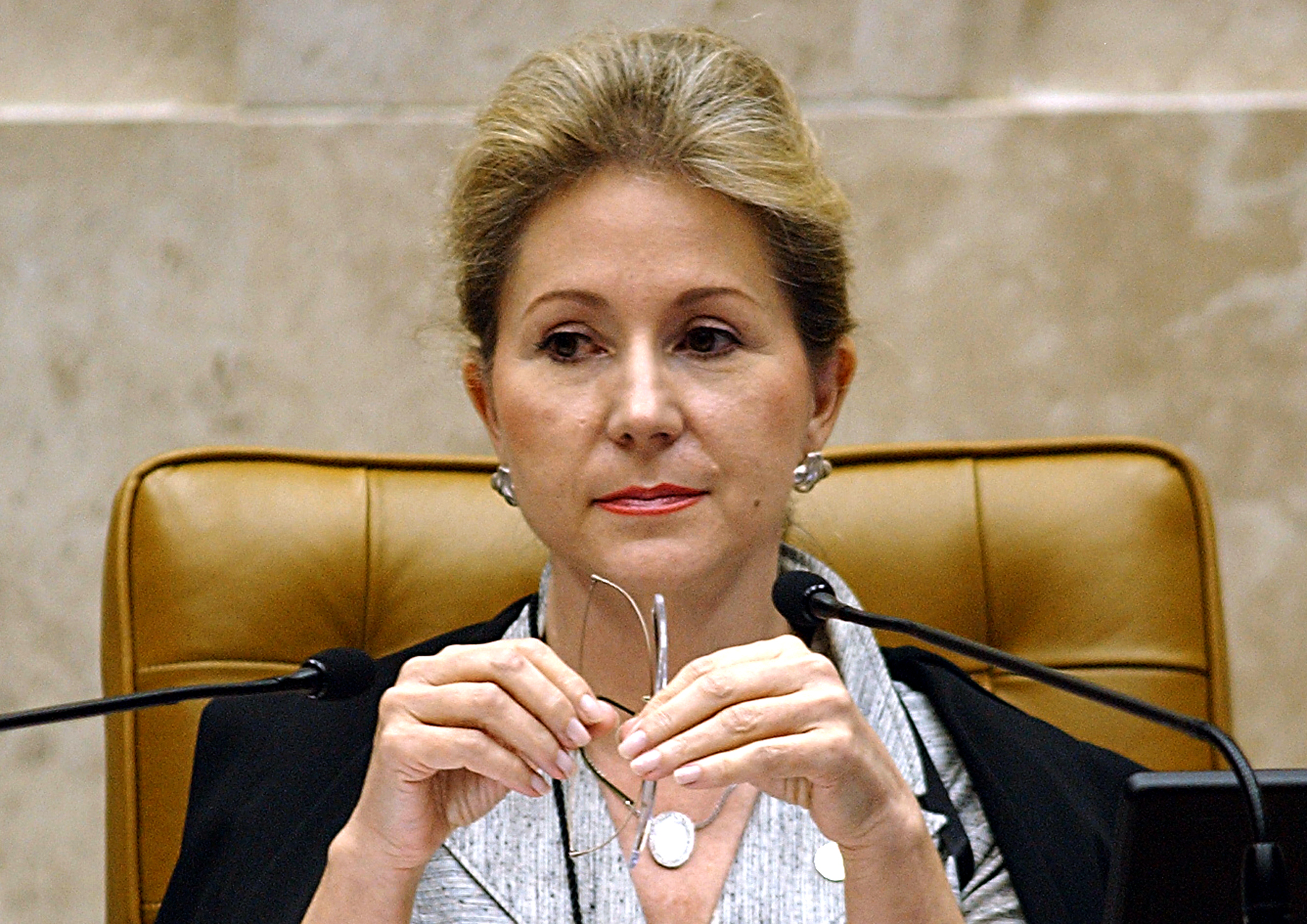 A ministra Ellen Gracie, presidente do Supremo Tribunal Federal (STF), conduz a sessão do tribunal que derrubou, por maioria de votos, a cláusula de barreira. Dos 11 ministros, seis consideraram inconstitucional a norma prevista no artigo 13 da Lei dos Partidos, que limitava a atuação das legendas que não obtiveram o patamar de votação exigido.